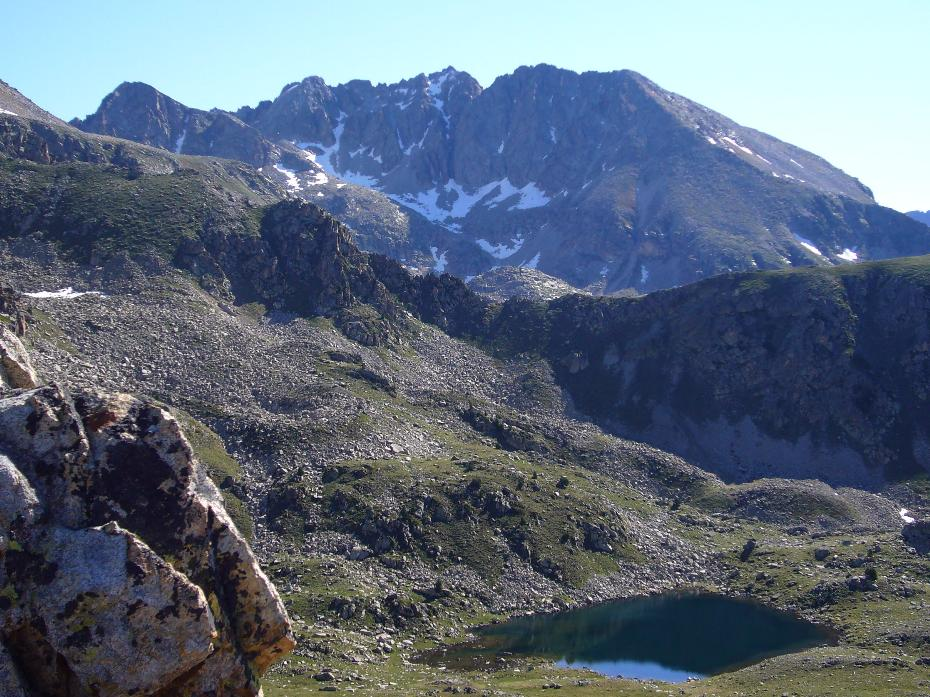 Estany Roi i Massís de Besiberri vistos des de la Collada de Fenerui; la Vall de Boí, Alta Ribagorça, Catalunya